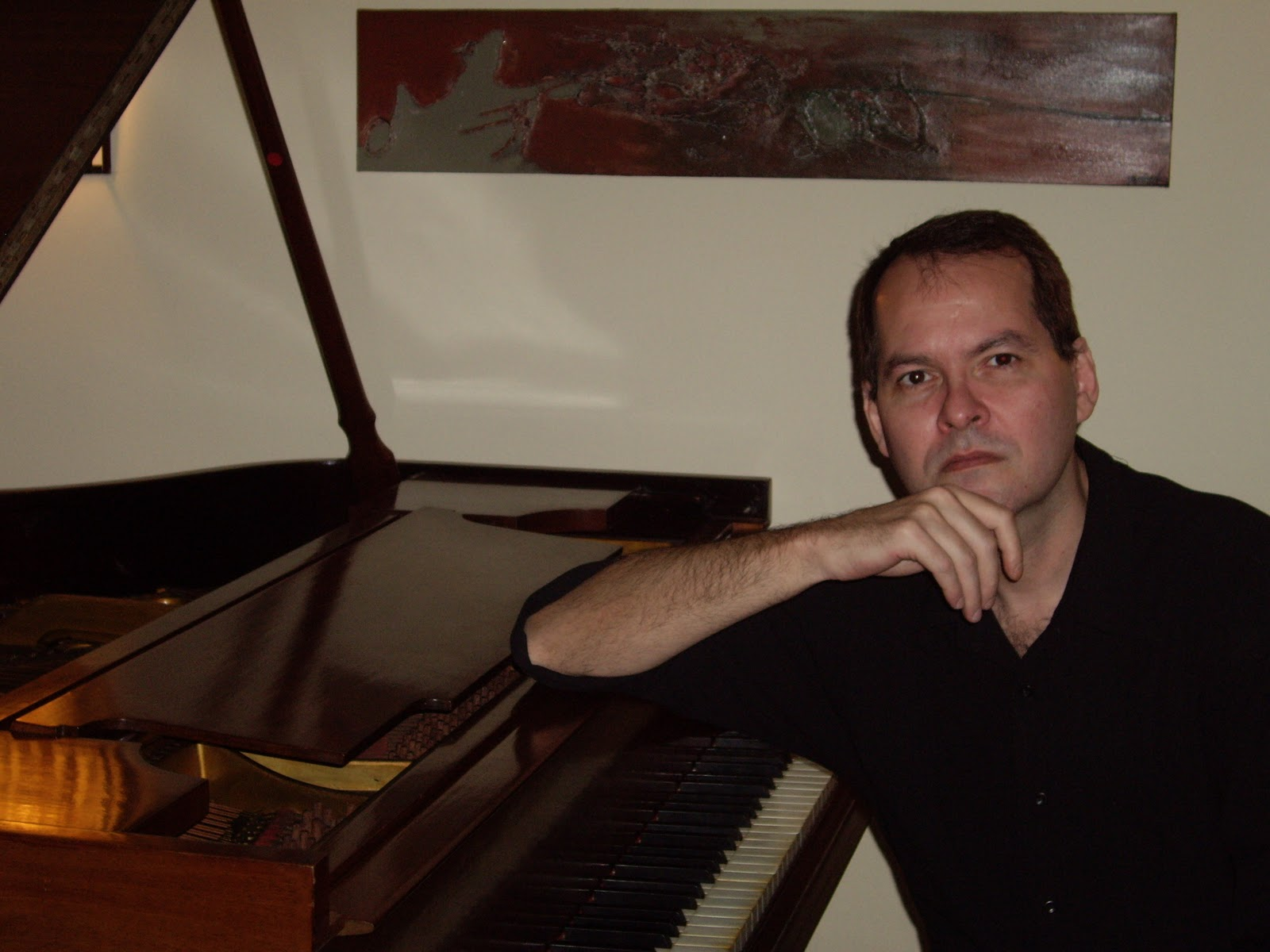 Marcelo de Alvarenga ao piano.